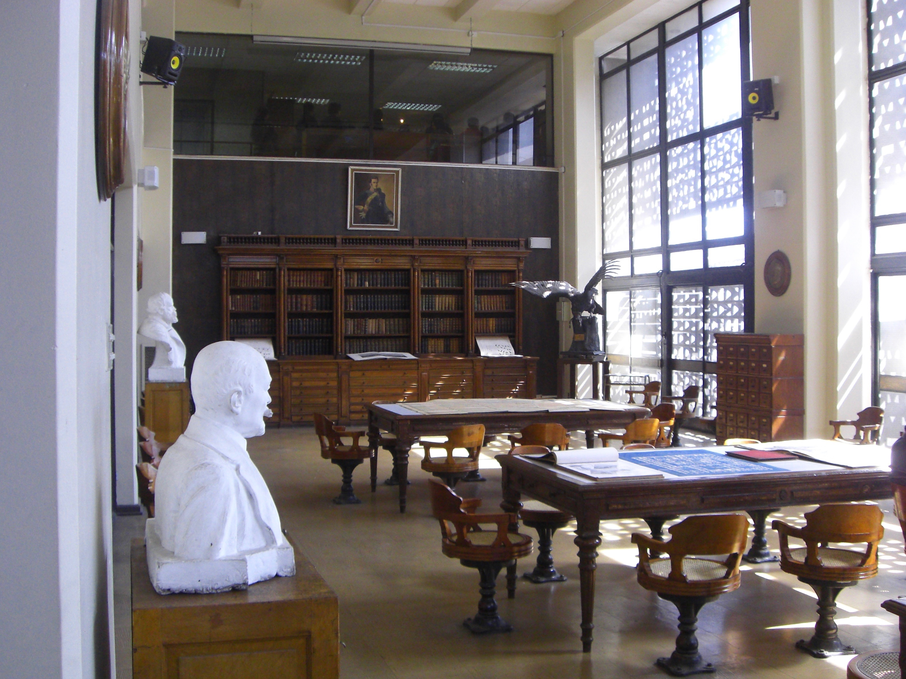 Vista del salón de Lectura de la Biblioteca del Instituto Nacional.